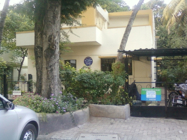 मराठी लेखक कै. जी.ए.कुलकर्णी यांचे निवासस्थान